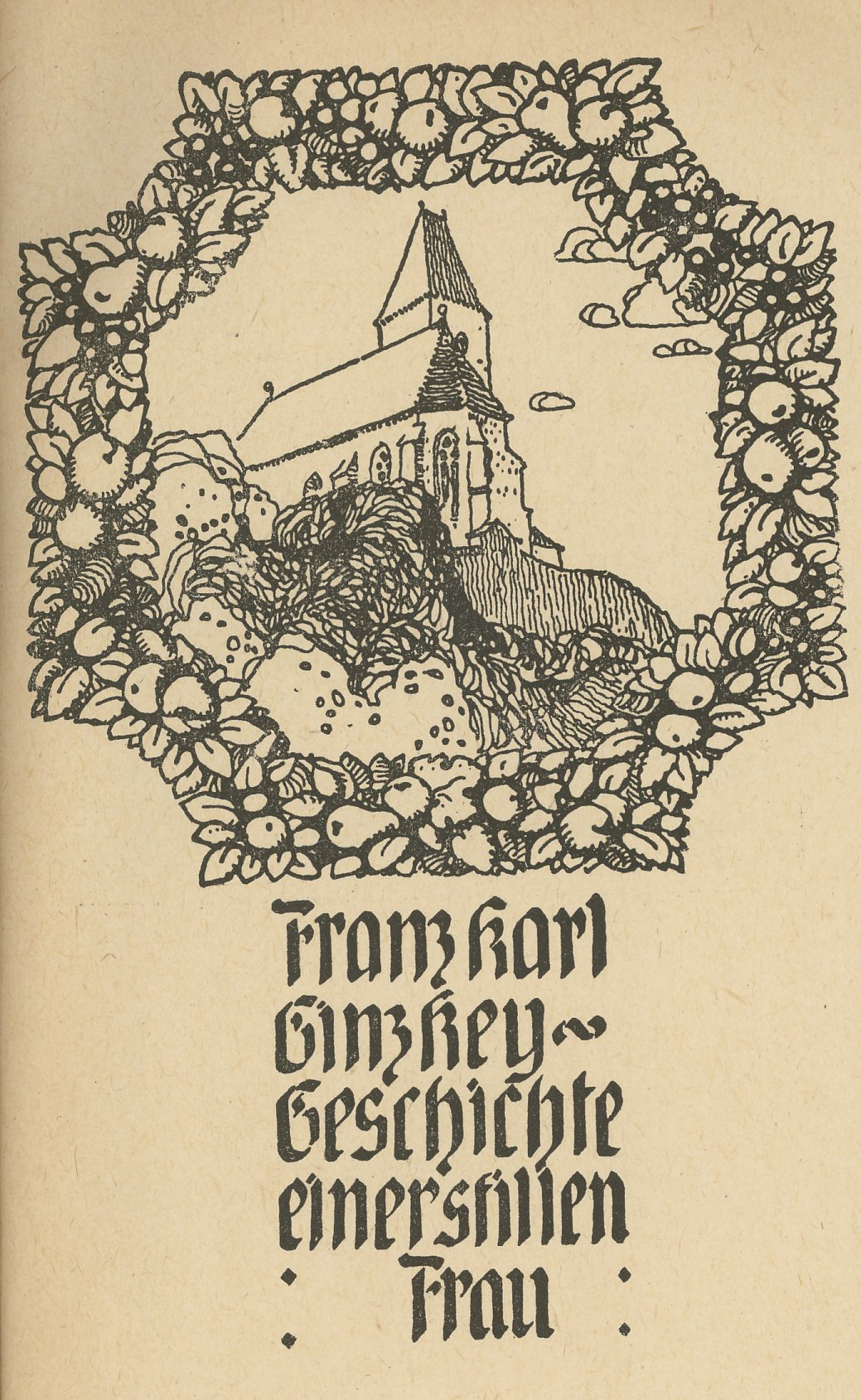 Frontispiz von Alfred Keller; in: Franz Karl Ginzkey, Geschichte einer stillen Frau. L. Staackmann, Leipzig 1909